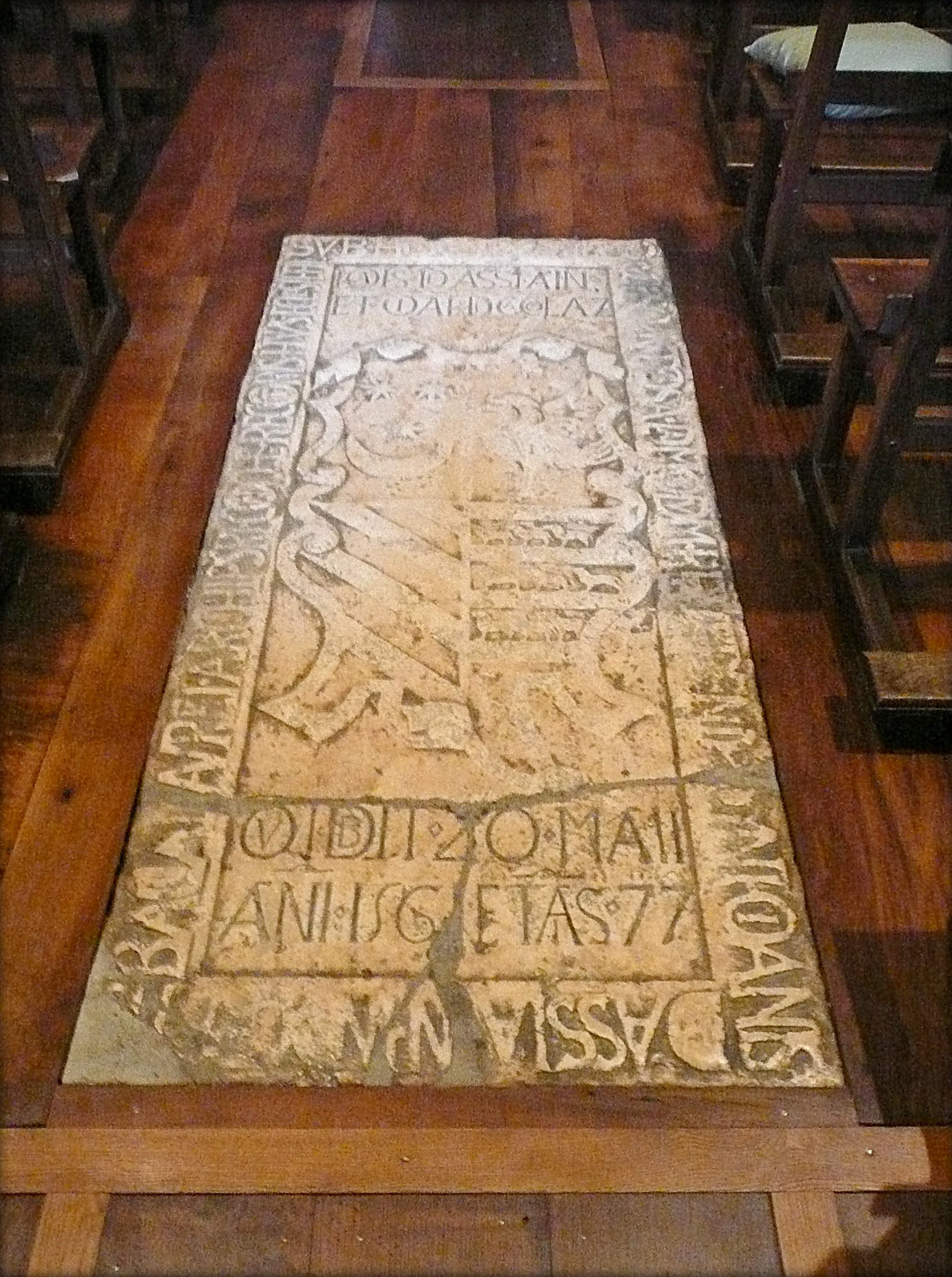 Tumba de alabastro en el interior de la Iglesia de Nuestra Señora de la Purificación de Gazólaz. La inscripción sobre el escudo dice: «IOAIS DE ASSIAIN / ET OIAE DE GACOLAZ» A los pies del escudo se lee: «QUI OBIT 20 MAII / ANI 156? ETAS 77» También tiene un epígrafe que hace de marco que reza así: «SUB HOC ... QUI ES CuNTOSSA ADMODUM REVERENDI DOMINI JOANIS DE ASSIAIN ... BACALOUREI ARCHSPRI CONCHE RECTORIS HUIUS ECLESIE»